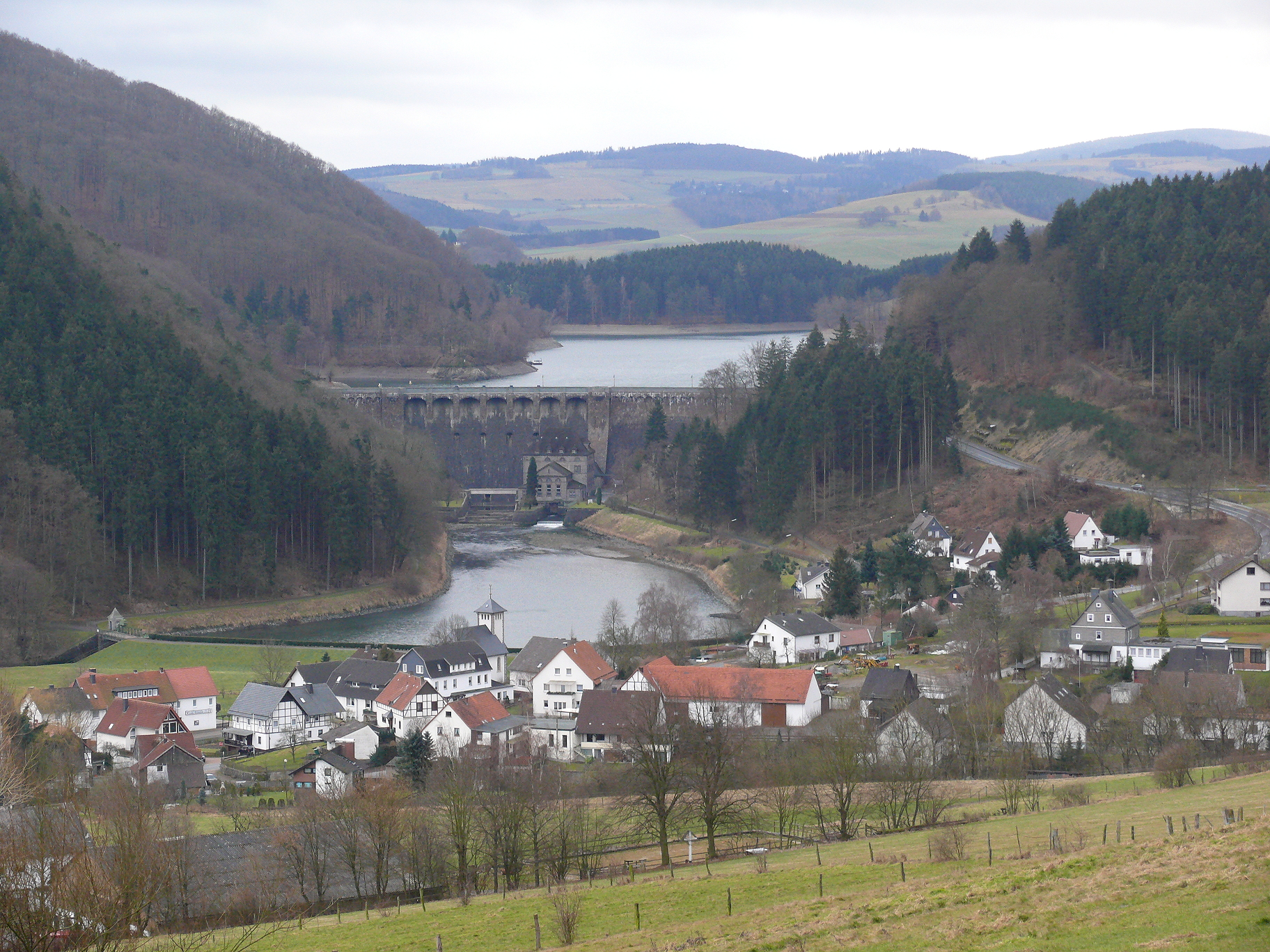 Diemeltalsperre mit Sperrmauer, Kraftwerk. Im Vordergrund die Ortschaft Helminghausen. Links der Eisenberg.